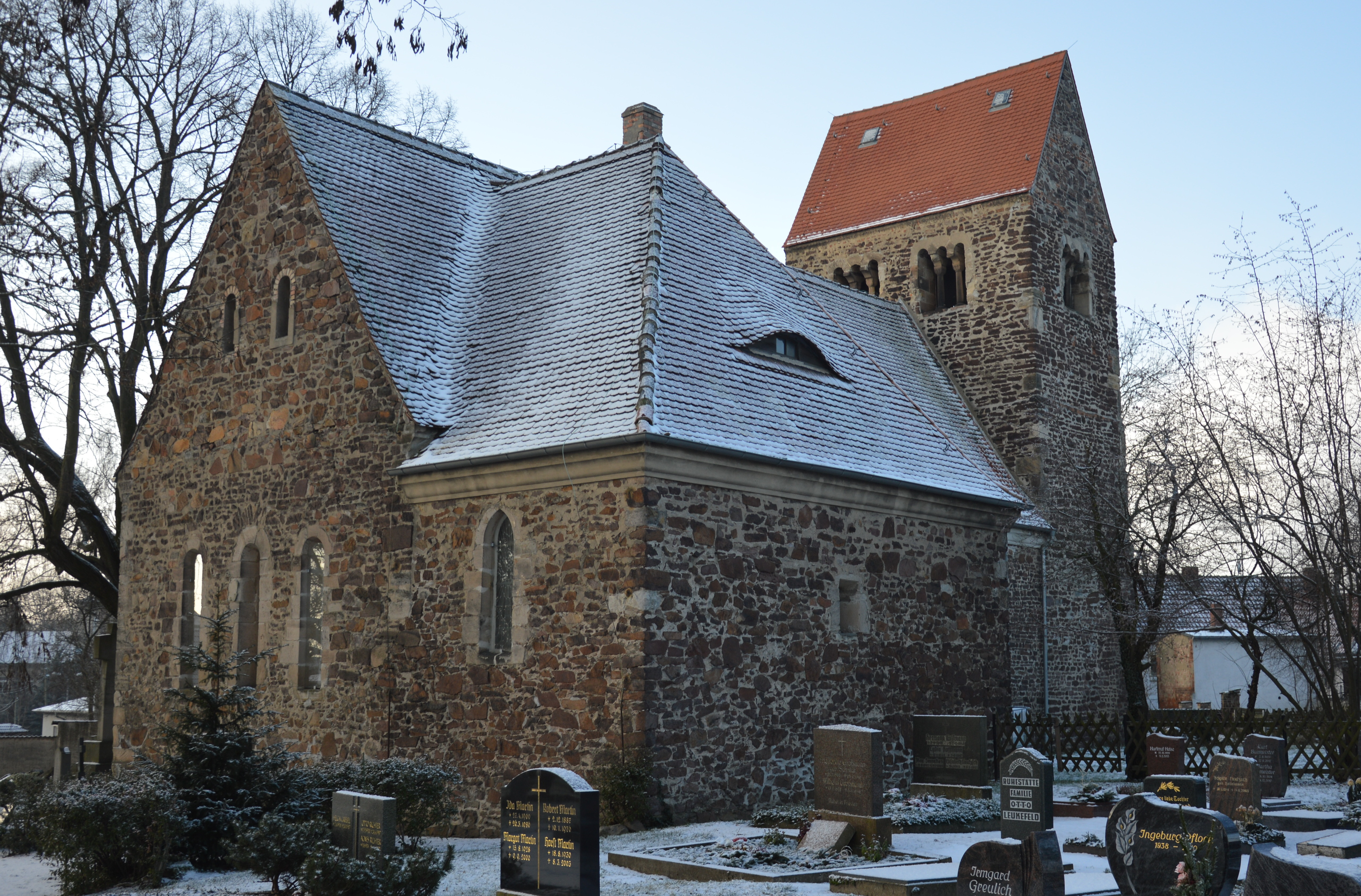 Kirche Oppin